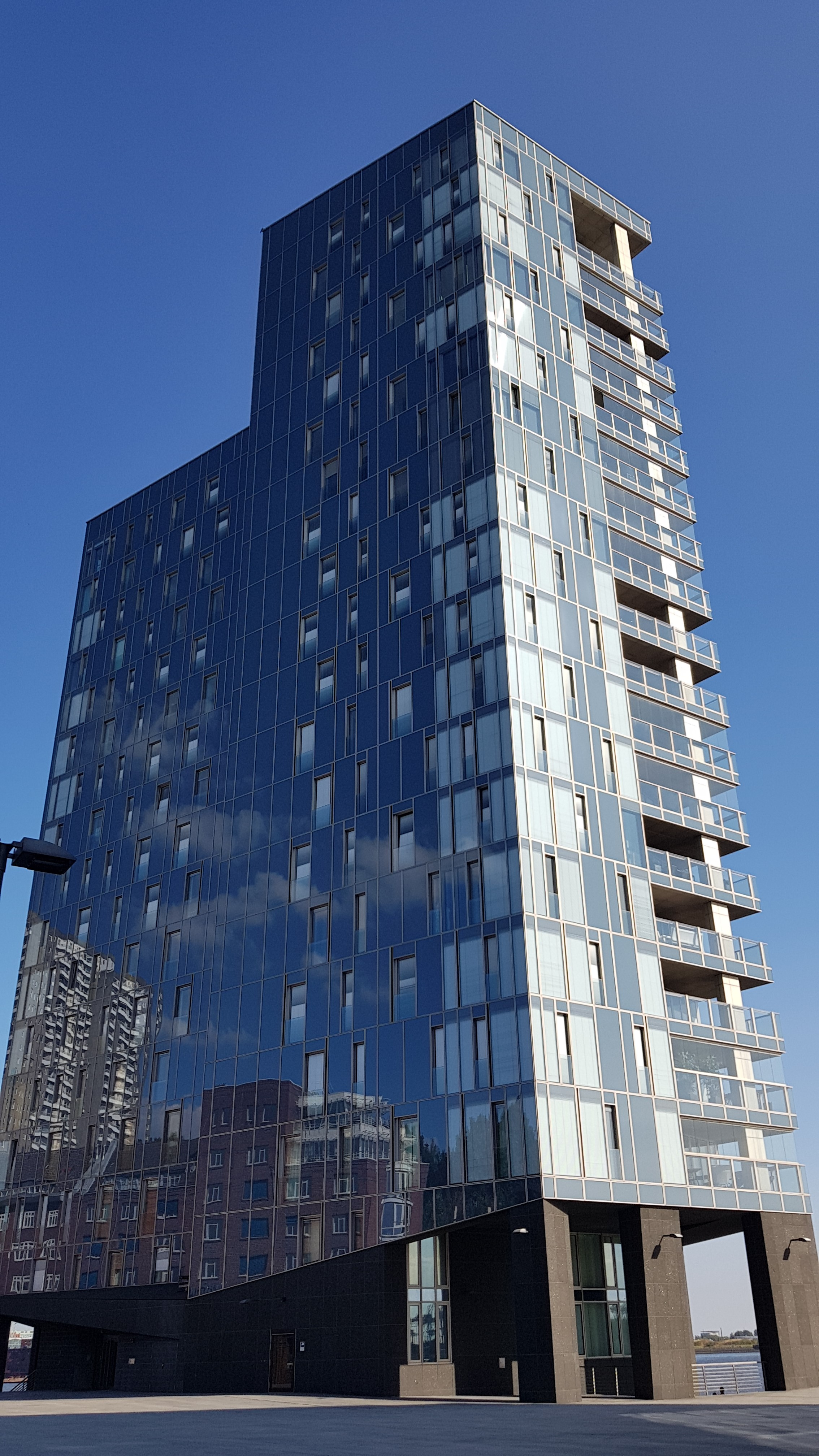 North front of the "Kristall Tower" in Hamburg Altona-Altstadt as part of the Hamburger Holzhafen.